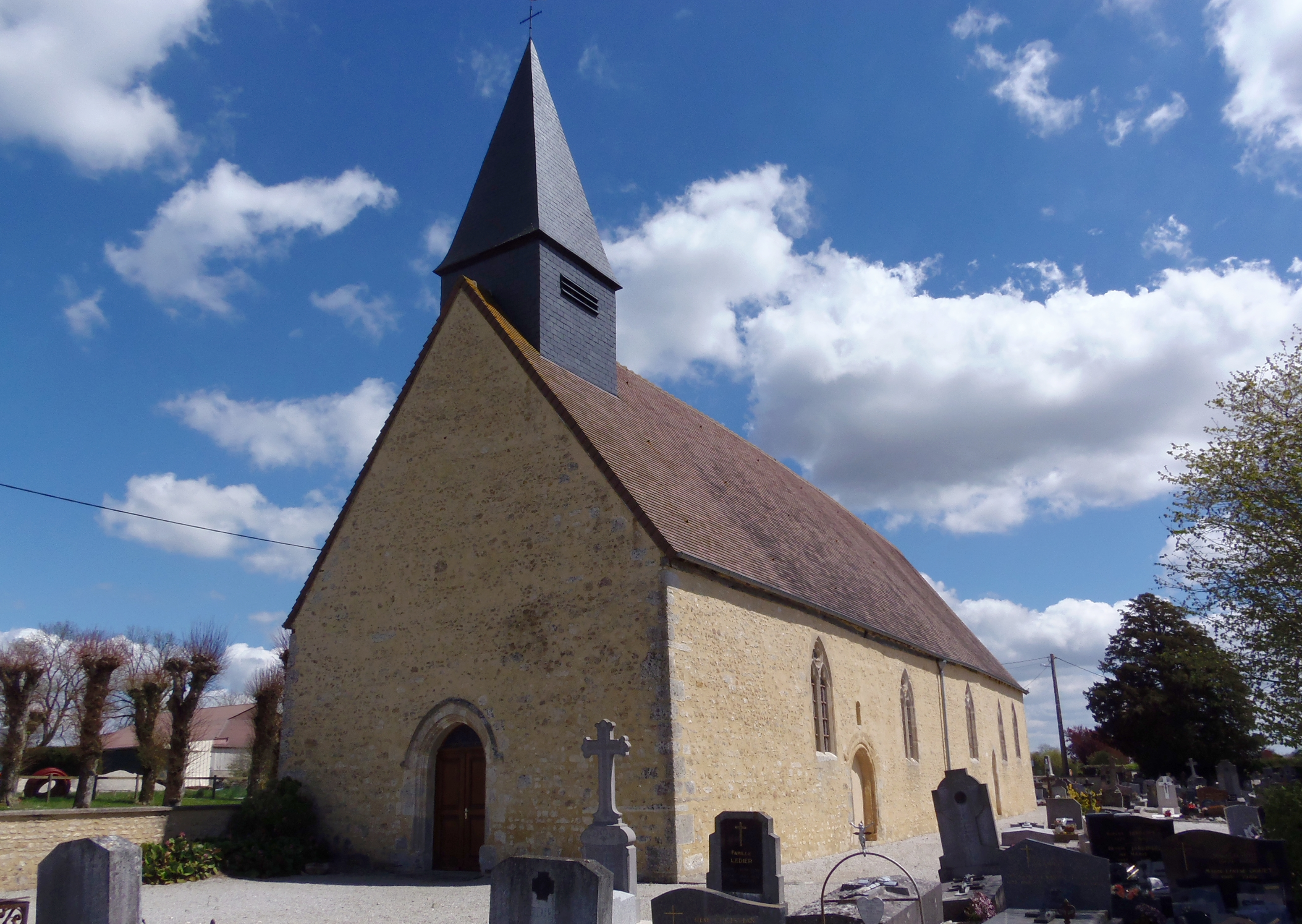 Aunou-sur-Orne (Normandie, France). L'église Sainte-Eulalie.